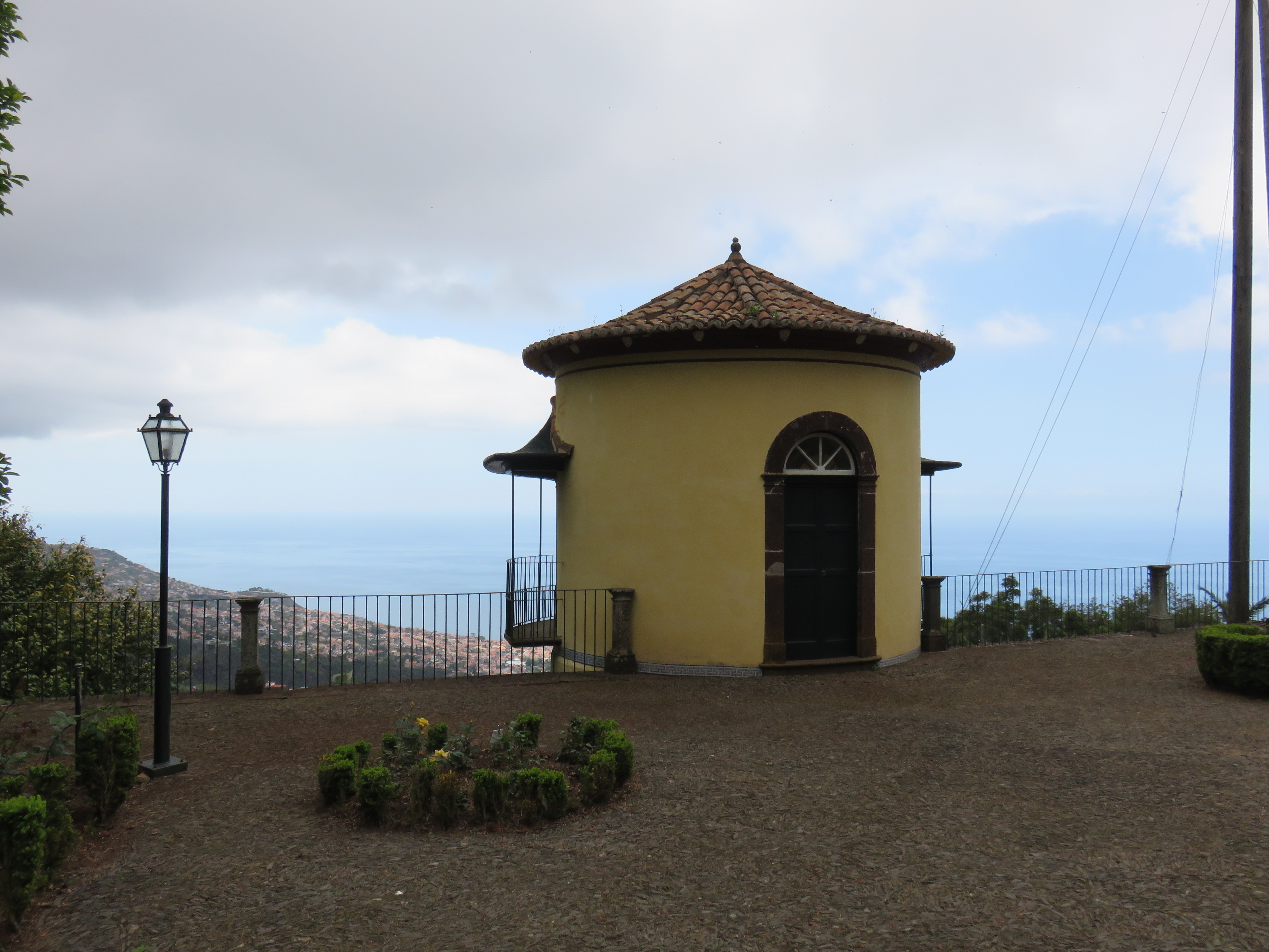 Quinta do Monte - quinta, jardins e parque no Monte, Funchal, Madeira, Portugal Cultural property Quinta do Monte, Monte, Funchal, Madeira, Portugal Q66815971, SIPA ID: 8371 Wiki Loves Monuments ID: DRC-M-220302041